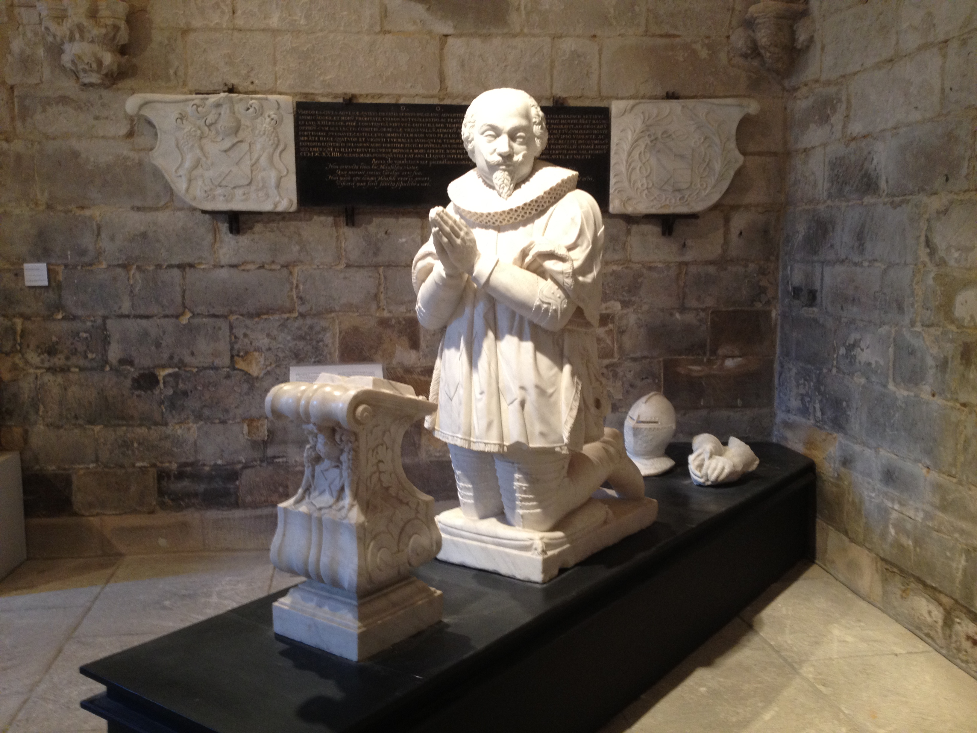 Orant de Charles de Fresnoy (1573-1624), seigneur de Fresnoy, capitaine-lieutenant des chevaux-légers de la régente Marie de Médicis et conseiller d'état. En marbre blanc du XVIIe siècle, il est attribué à l'entourage de Michel Bourdin. Provenant de l'église de Neuilly-en-Thelle jusqu'à la Révolution, il est ensuite conservé par la famille jusqu'à son acquisition. Classé Trésor national.